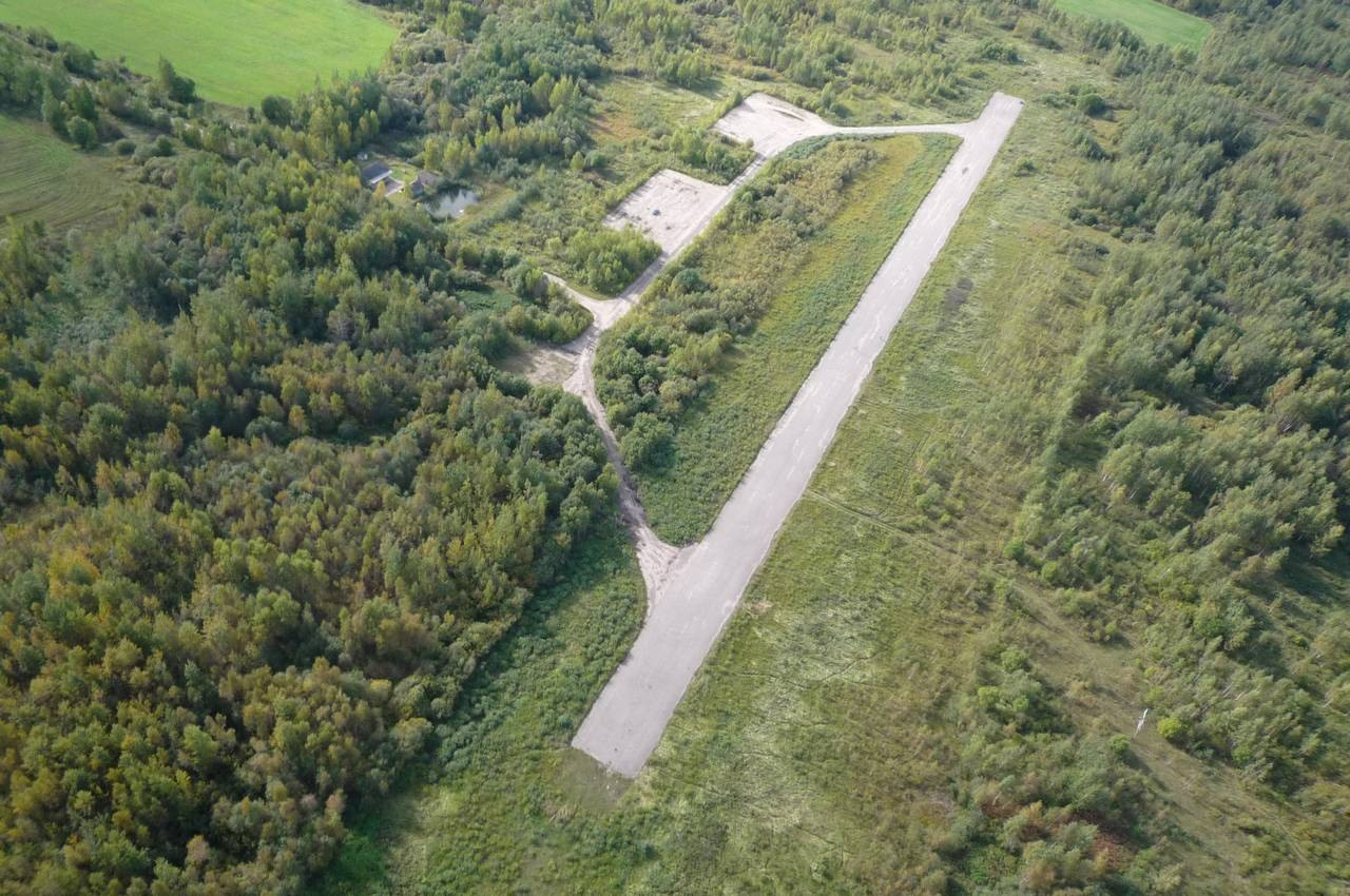 Взлетно-посадочная полоса бывшего аэродрома близ дер.Фешково Бежаницкого района Псковской области